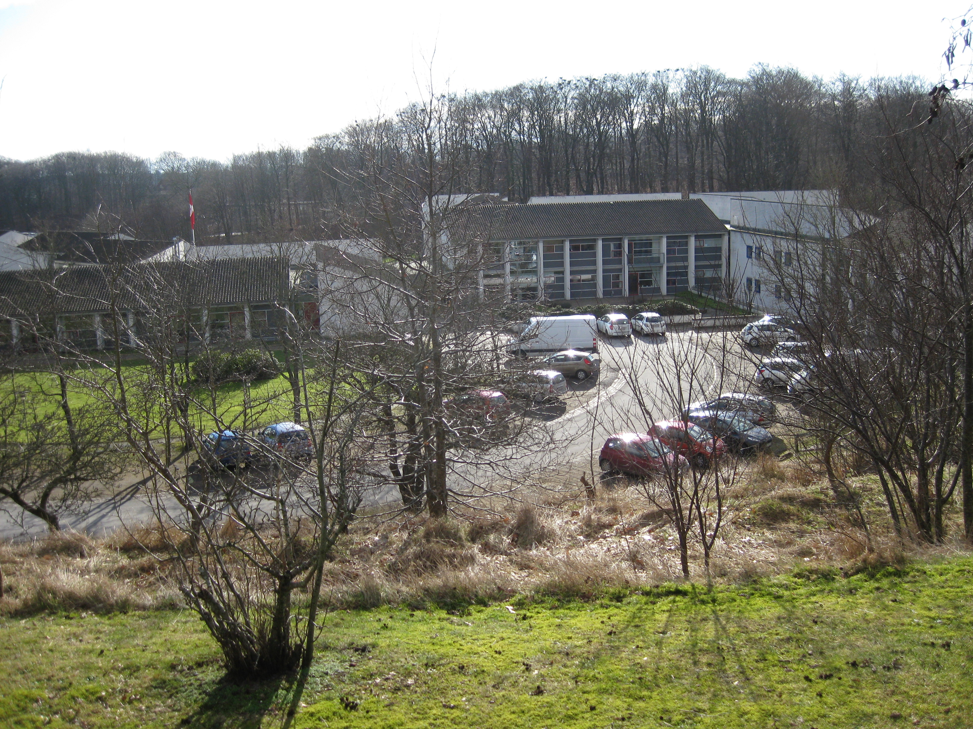 Bernadottegården i Hadsund